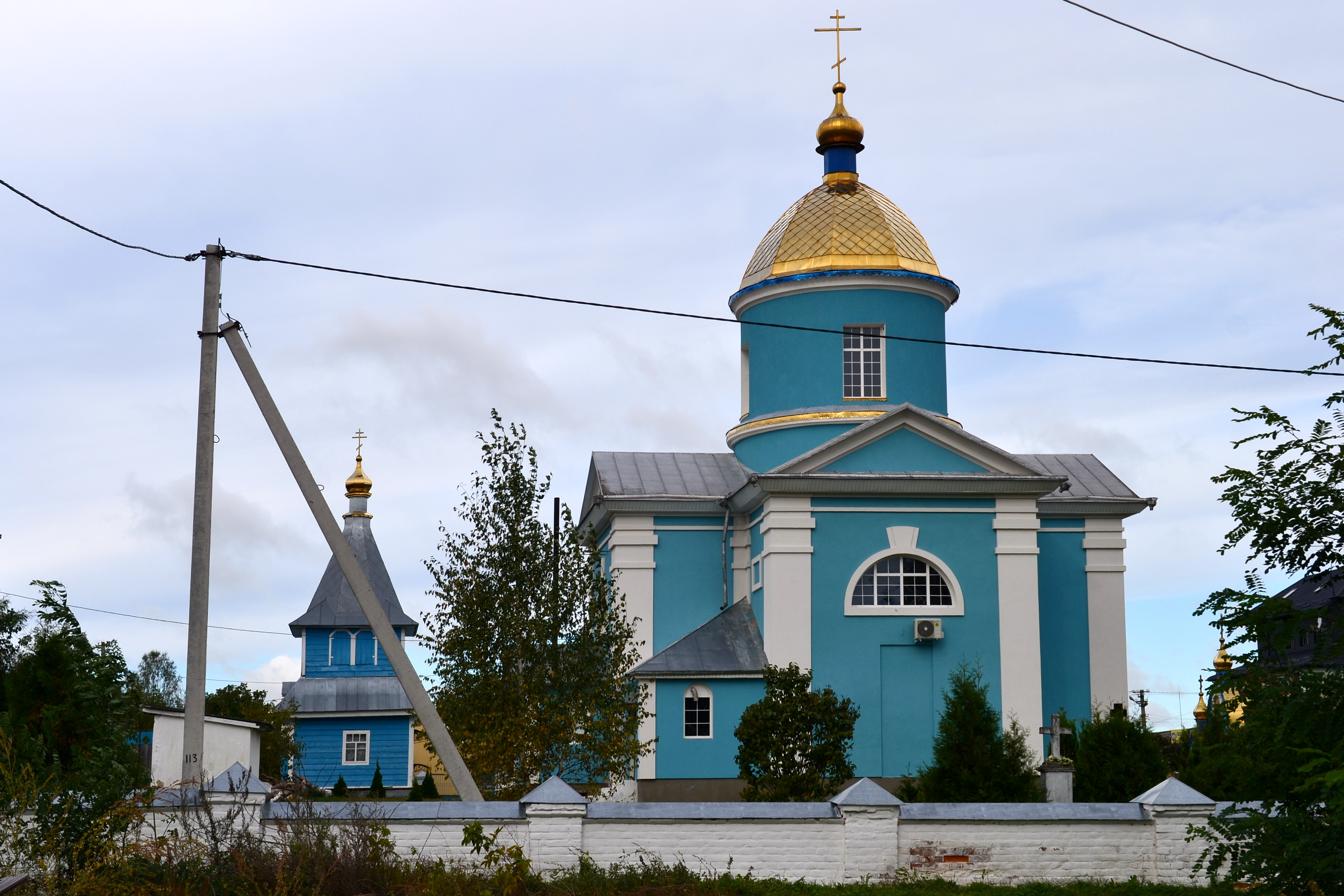 Покровська церква (мур.) (1843 рік) - вигляд зі сходу з дзвіницею - Цумань (вул. Шевченка) Ківерцівський район Волинська область Україна